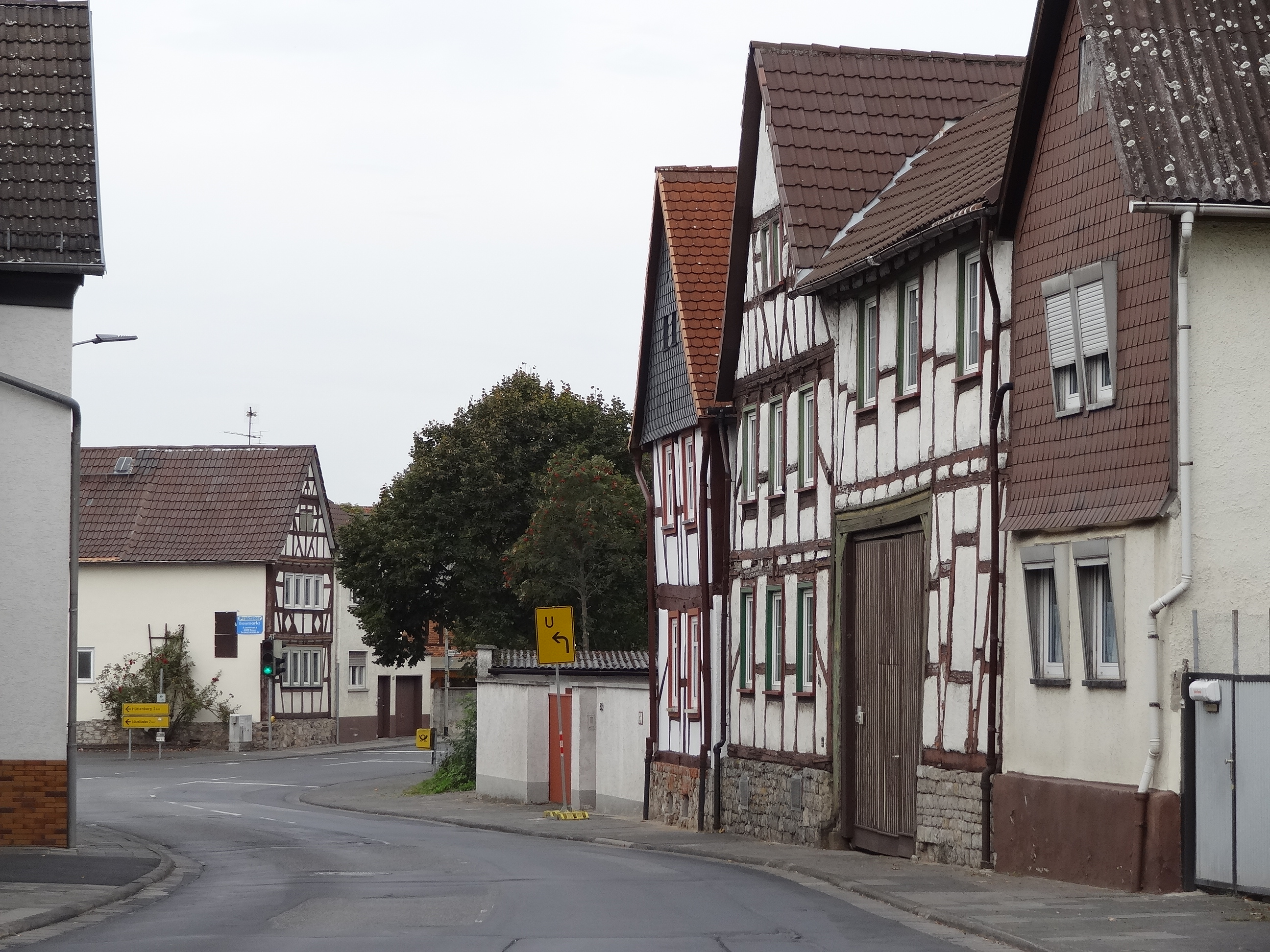 Gesamtanlage historischer Ortskern (Großen-Linden)